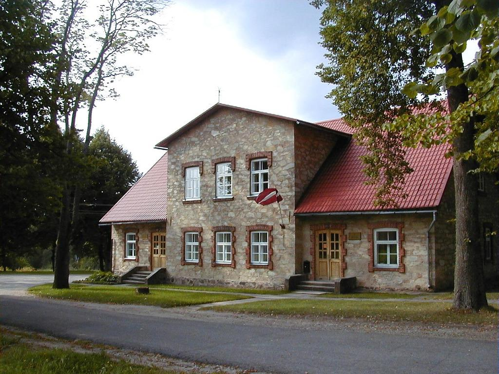 Liepas pagastnams 2001-09-02